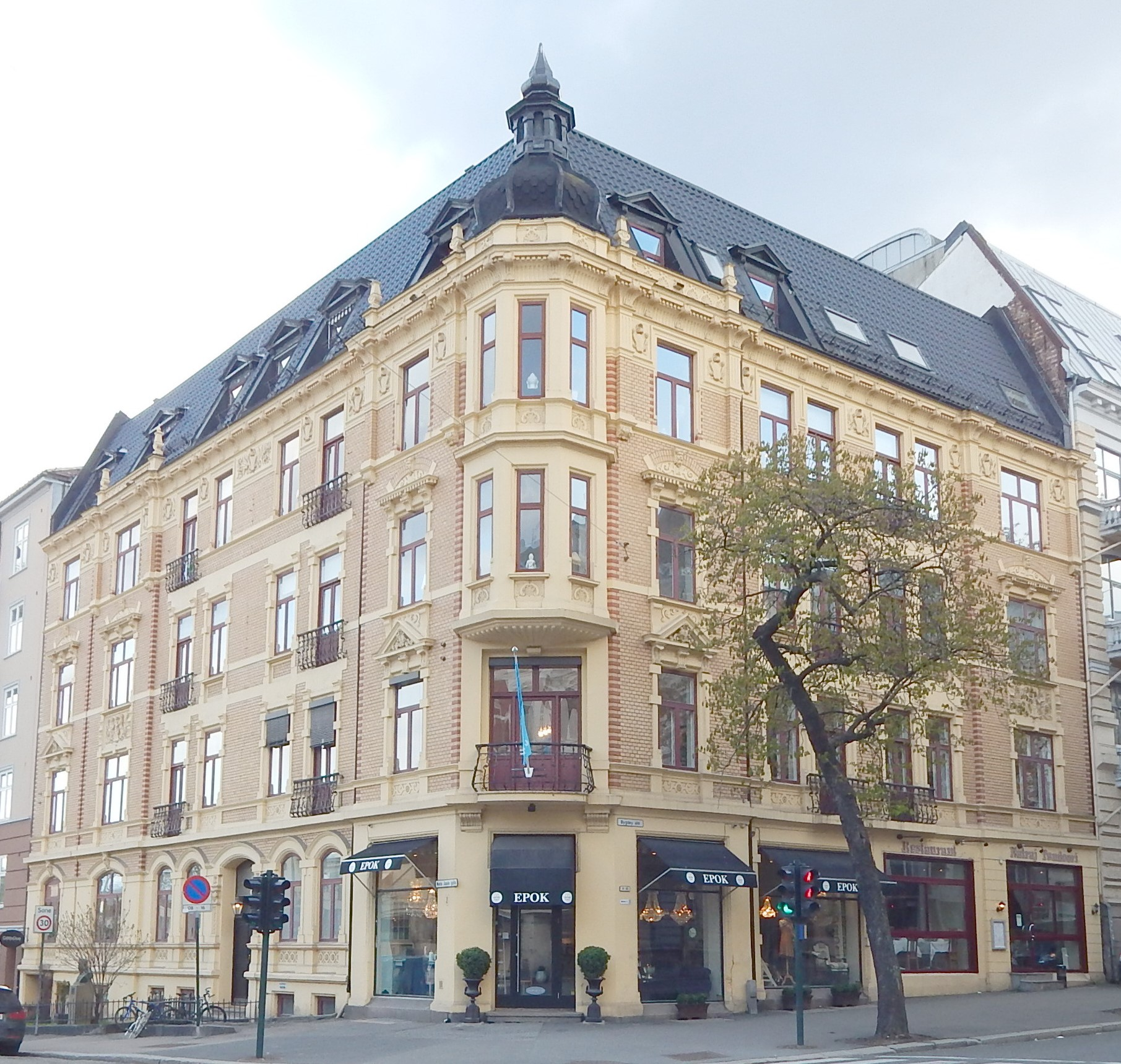 Bygdøy allé 8. Arkitekt: Carl Michalsen (1896).